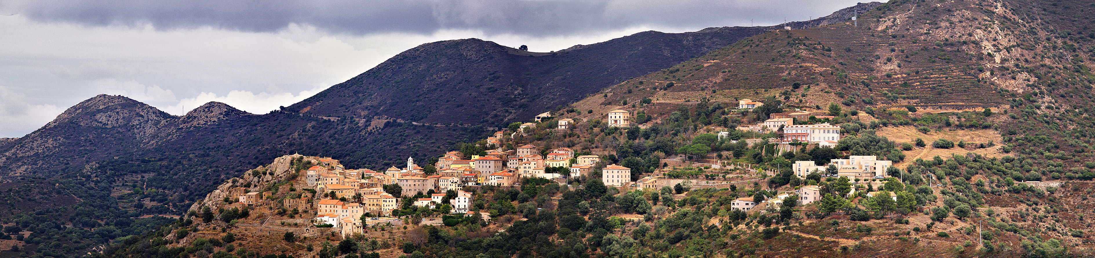 Belgodere - Panorama